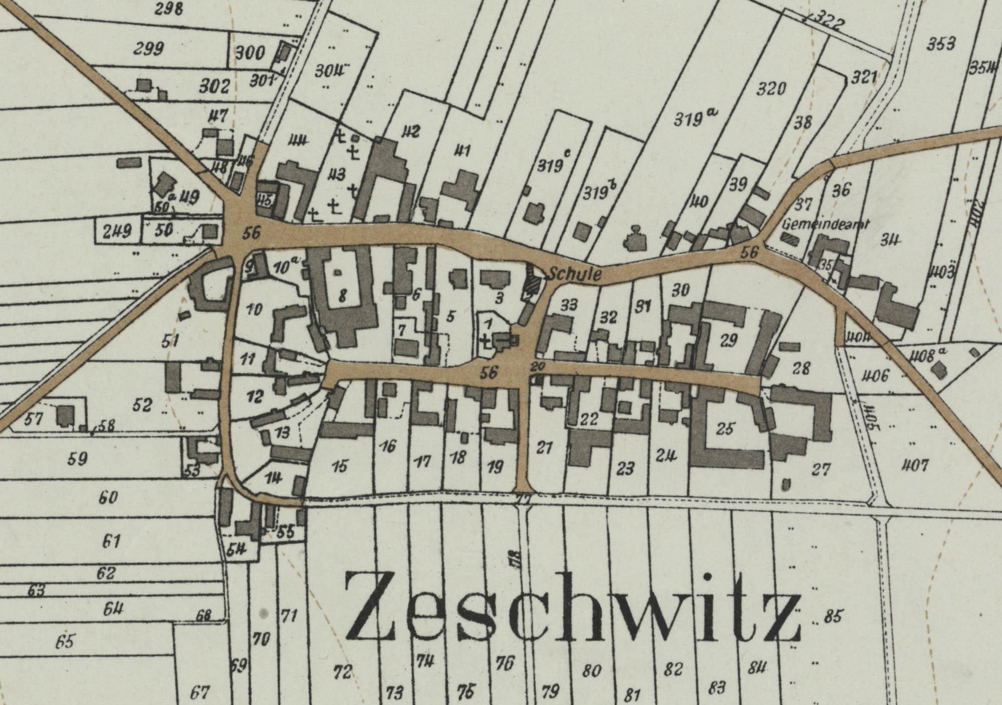 Grundkarte Zeschwitz (Leipzig) innerdörfisch 1931 (Ausschnitt von Karte 26g). Maßstab 1 : 5000.